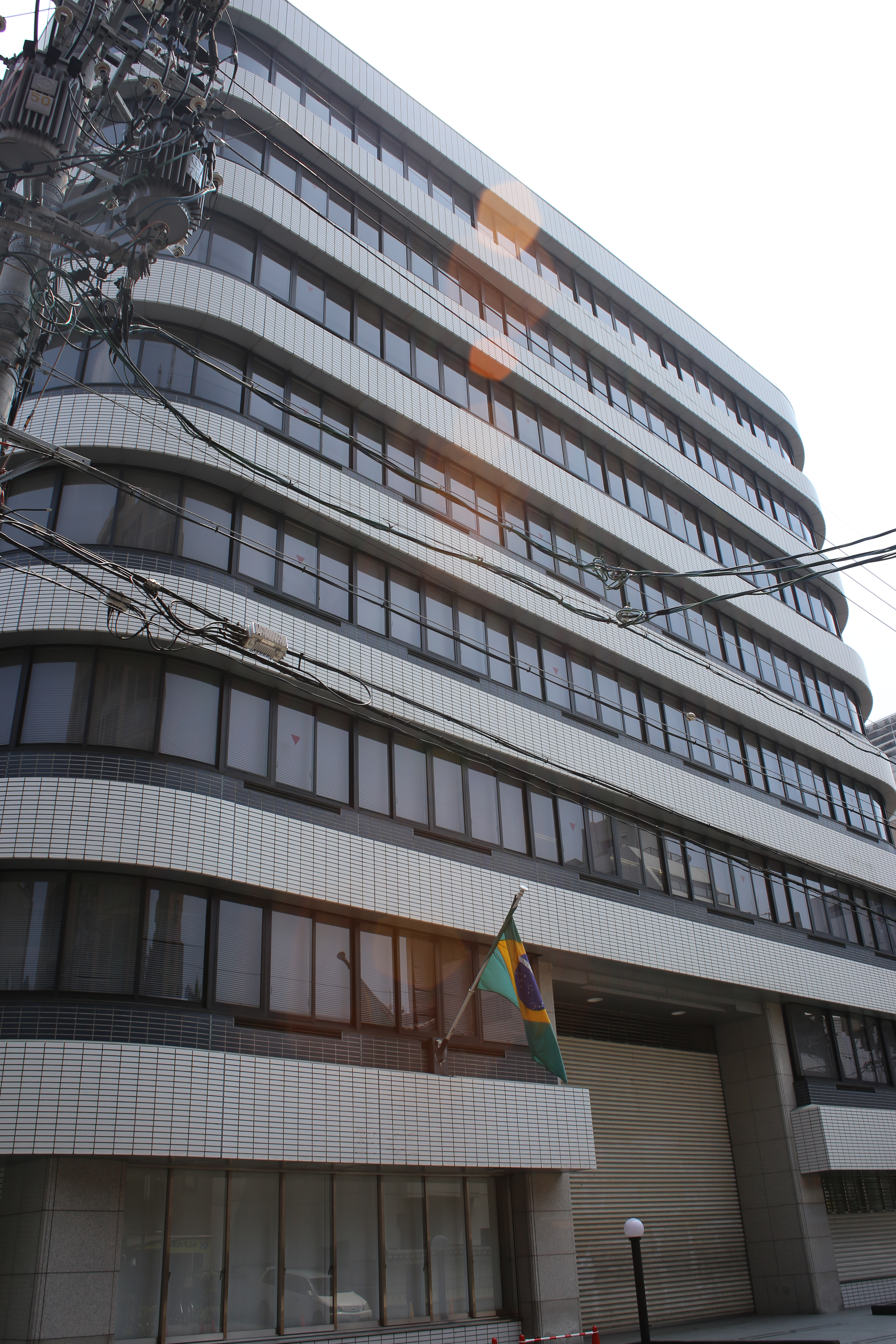 名古屋市中区丸の内一丁目の白川第8ビルを西側公道北側より撮影